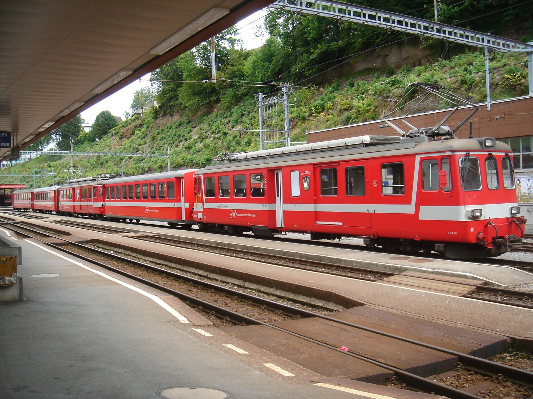 Verstärkter Pendelzug der Appenenzeller Bahnen in Herisau: ABt 146 - B 243 - BDe 4/4 47 - B 236 (ex FLP) - BDe 4/4 46